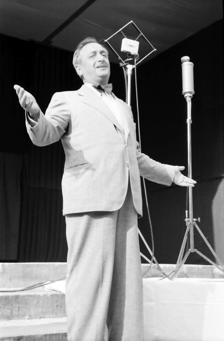 Schloss Güterfelde, Truppenbetreuung: Hans Moser